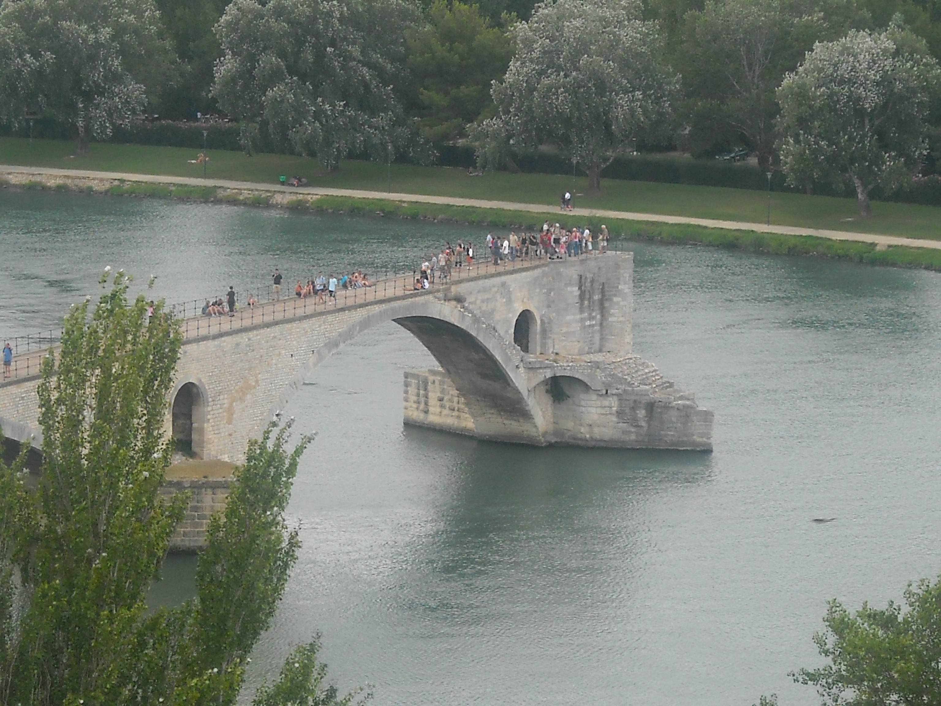 Il ponte Saint Benézet di Avignone